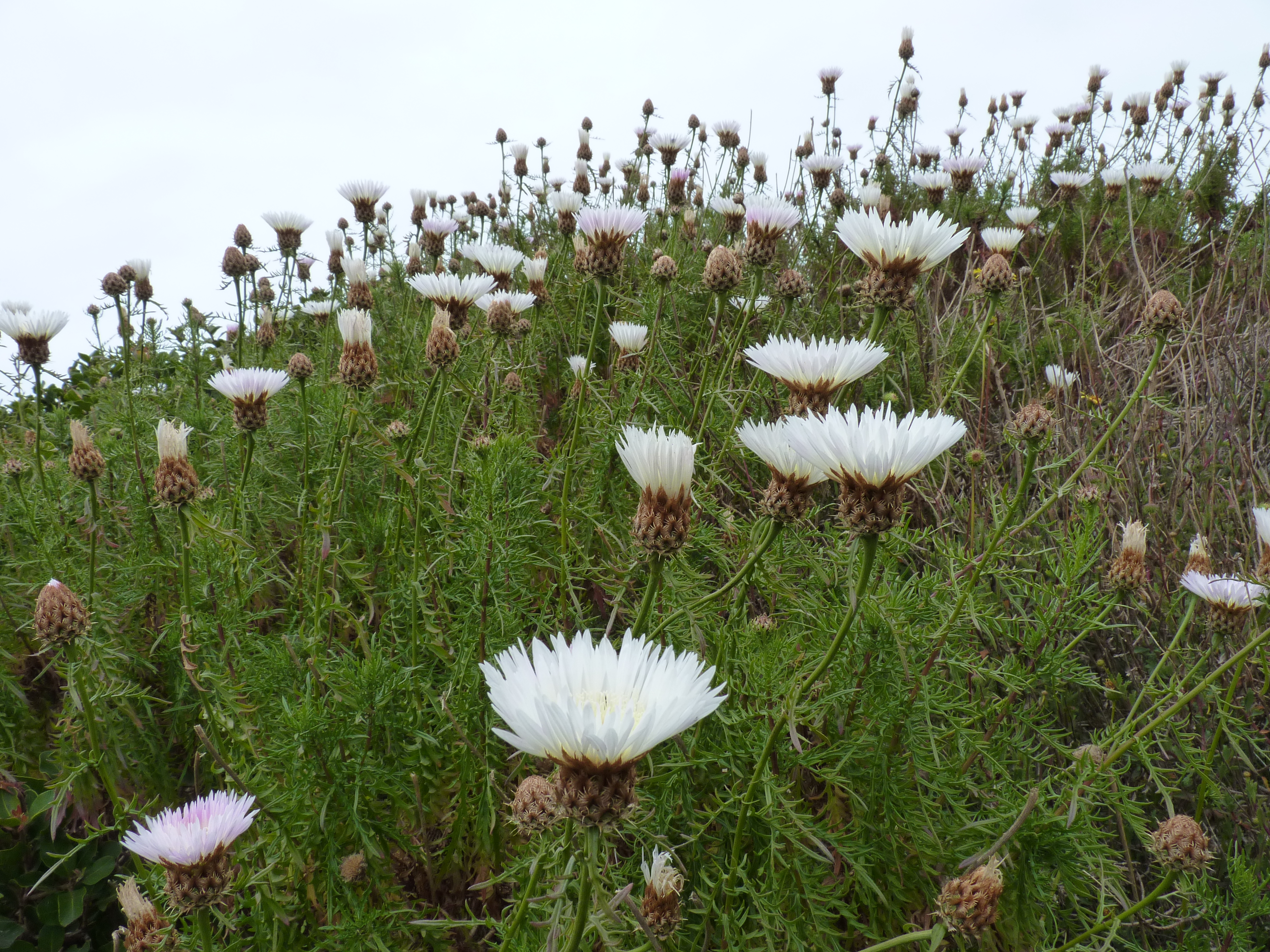 Los Vilos, ultimos estertores del desierto florido